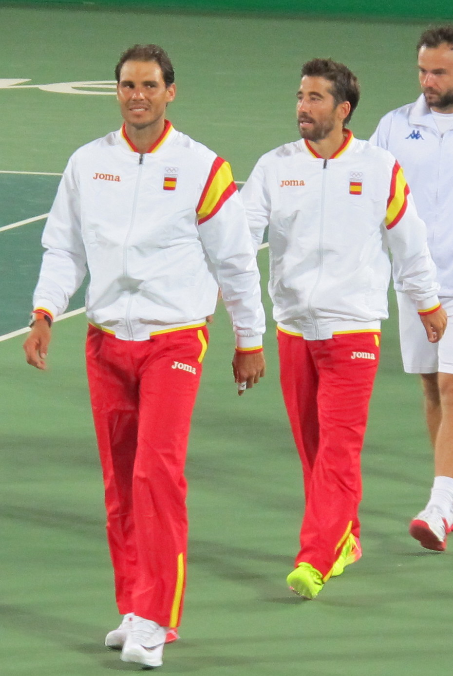 Nadal e Lopez caminham para receber as medalhas de ouro, Centro Olímpico de Tênis. Rio 2016